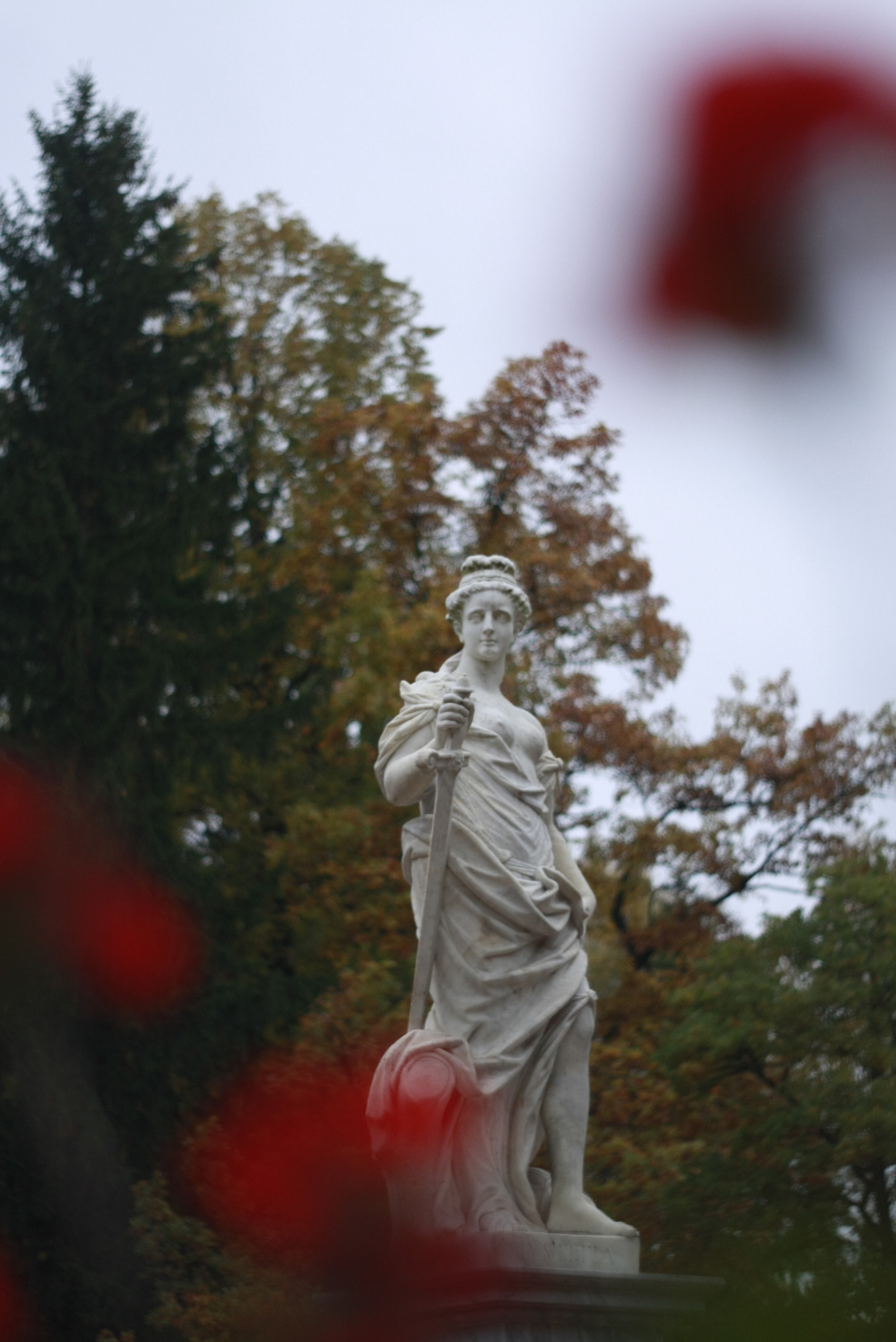 Статуя «Правосудие» (Санкт-Петербург и Лен.область, Павловск, в центре западного круга)